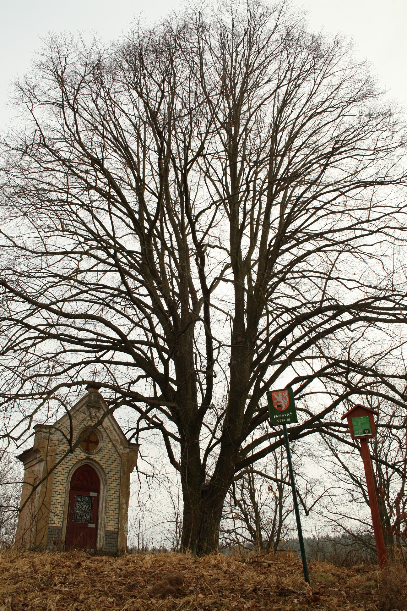 Památný strom, Lípa na Purku, Mirošov, okr. Rokycany